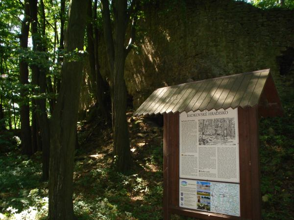 Zřícenina hradu Radkov